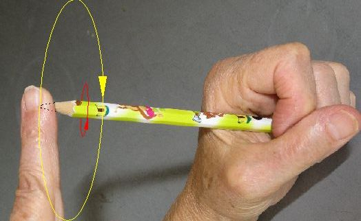 Bleistift von einer Faust umschlossen und mit einem Finger der anderen Hand auf einer Kegelfläche geführt. Er taumelt (gelber Pfeil) und rotiert (roter Pfeil) entgegengesetzt um seine Achse, verursacht durch das Abrollen in der Faust.